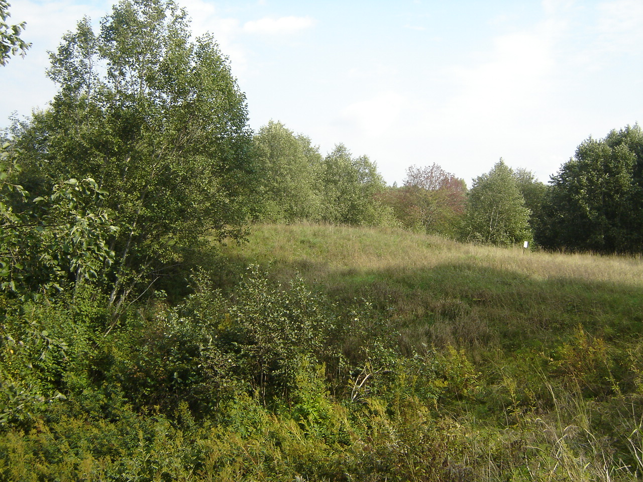 Lohu väiksema linnamäe nõlv